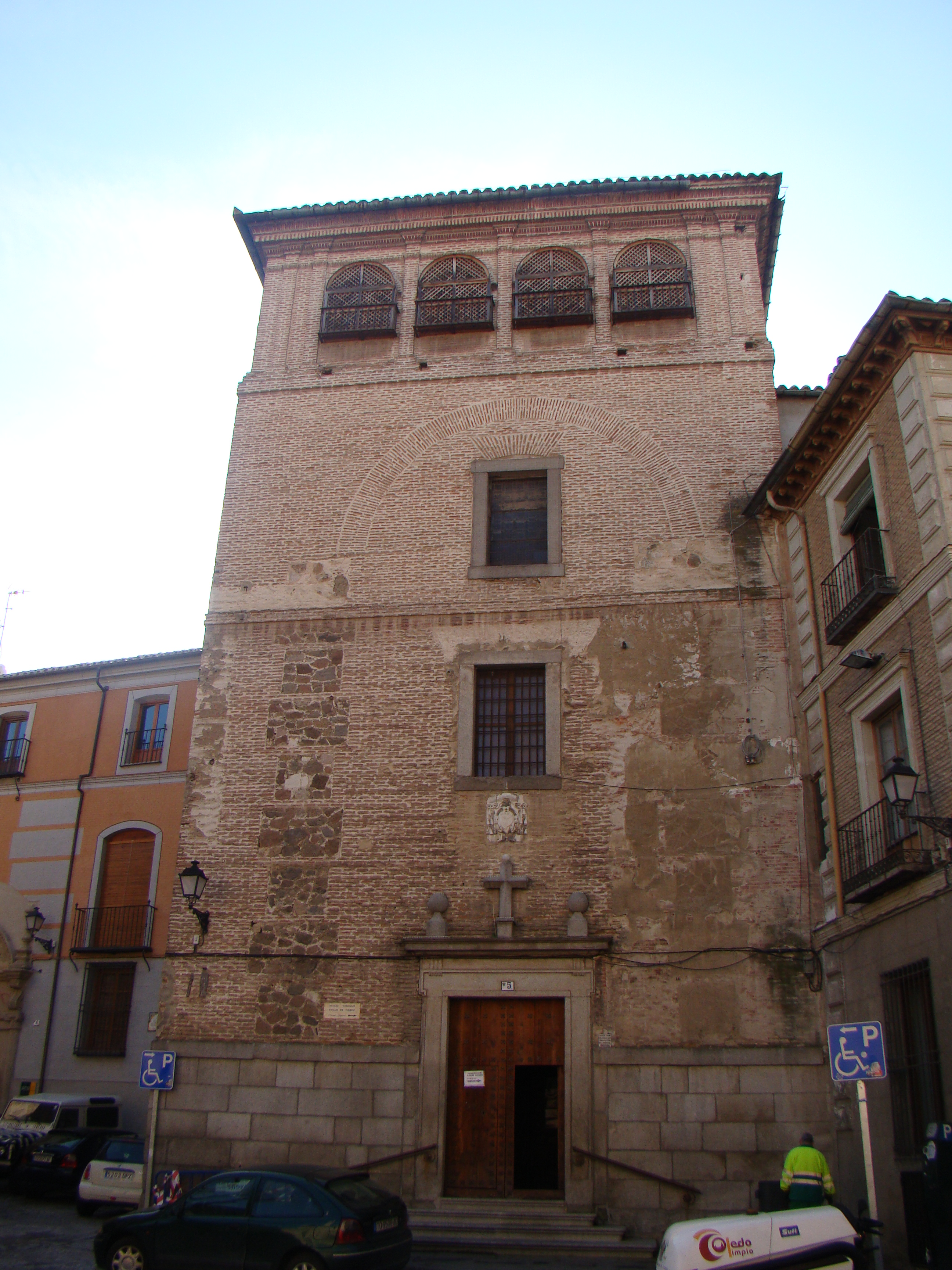 Convento de las Agustinas Calzadas de la Purísima Concepción (Gaitanas)